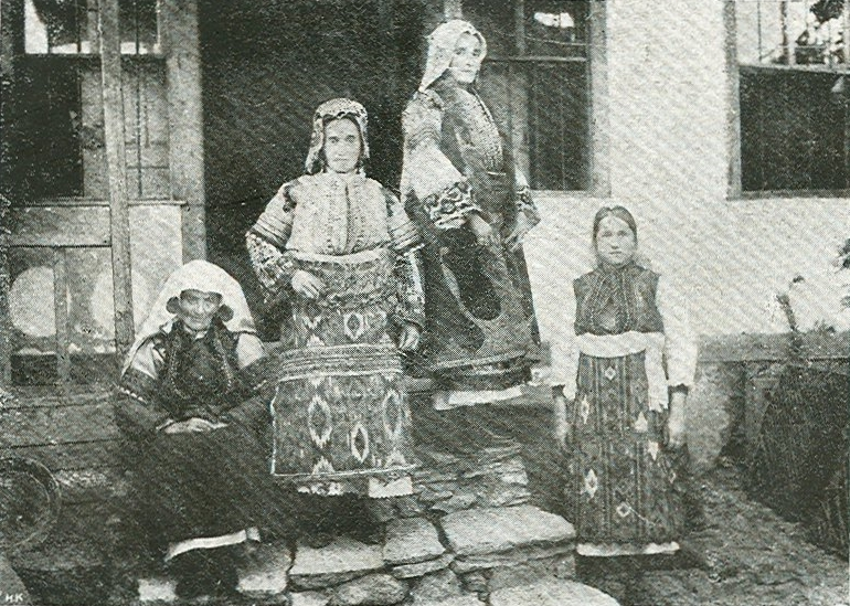 Жени од Дебар во почетокот на XX век